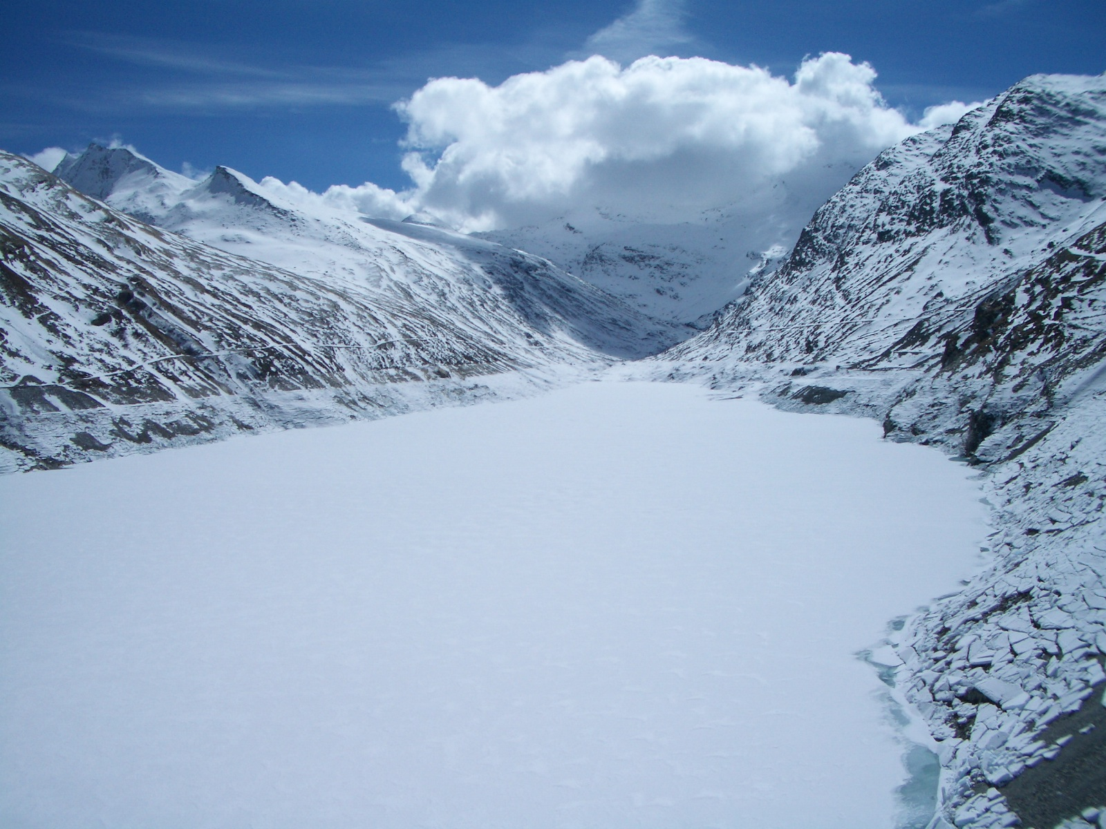 Mattmarkstausee im Saastal in der Schweiz.